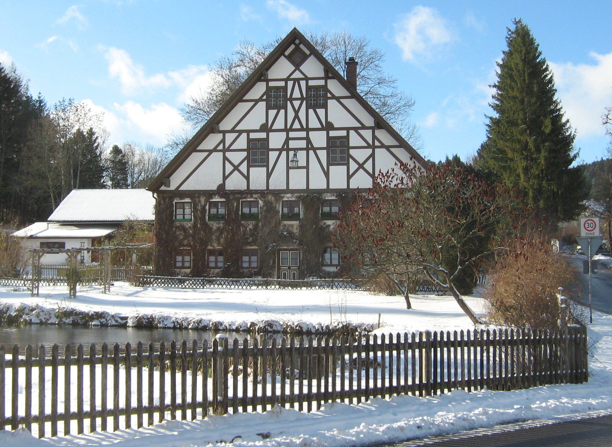 Alte Papiermuehle in Oberbeuren